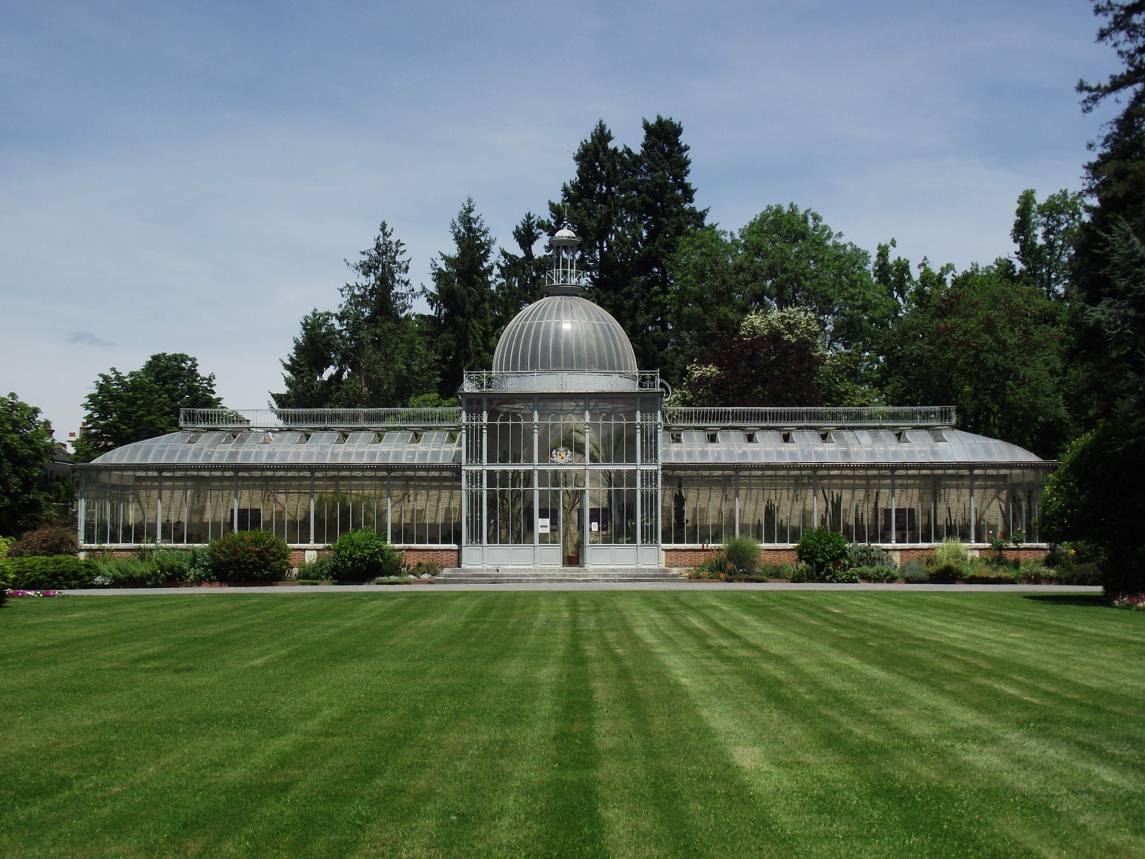 Orangerie du jardin Massey (Tarbes, Hautes-Pyrénées, France)